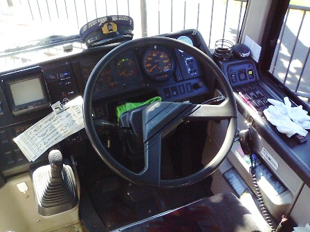 Hino S'elega cockpit.